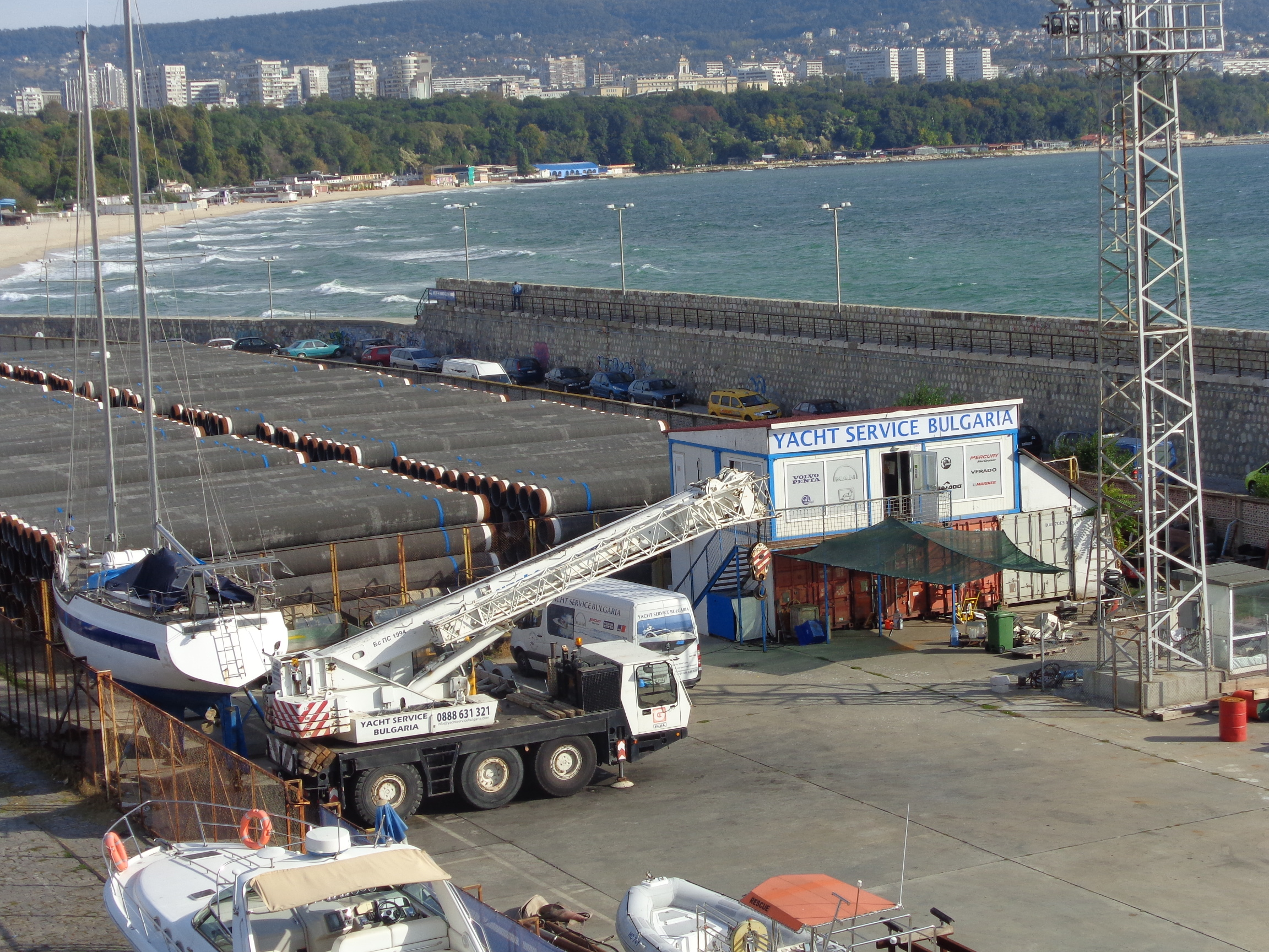 Zwischengelagerte Gasröhren im Hafen von Warna